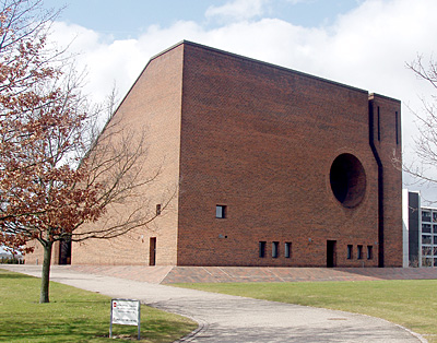 Ravnsbjergkirken Ravnsbjerg Sogn, Århus , Denmark